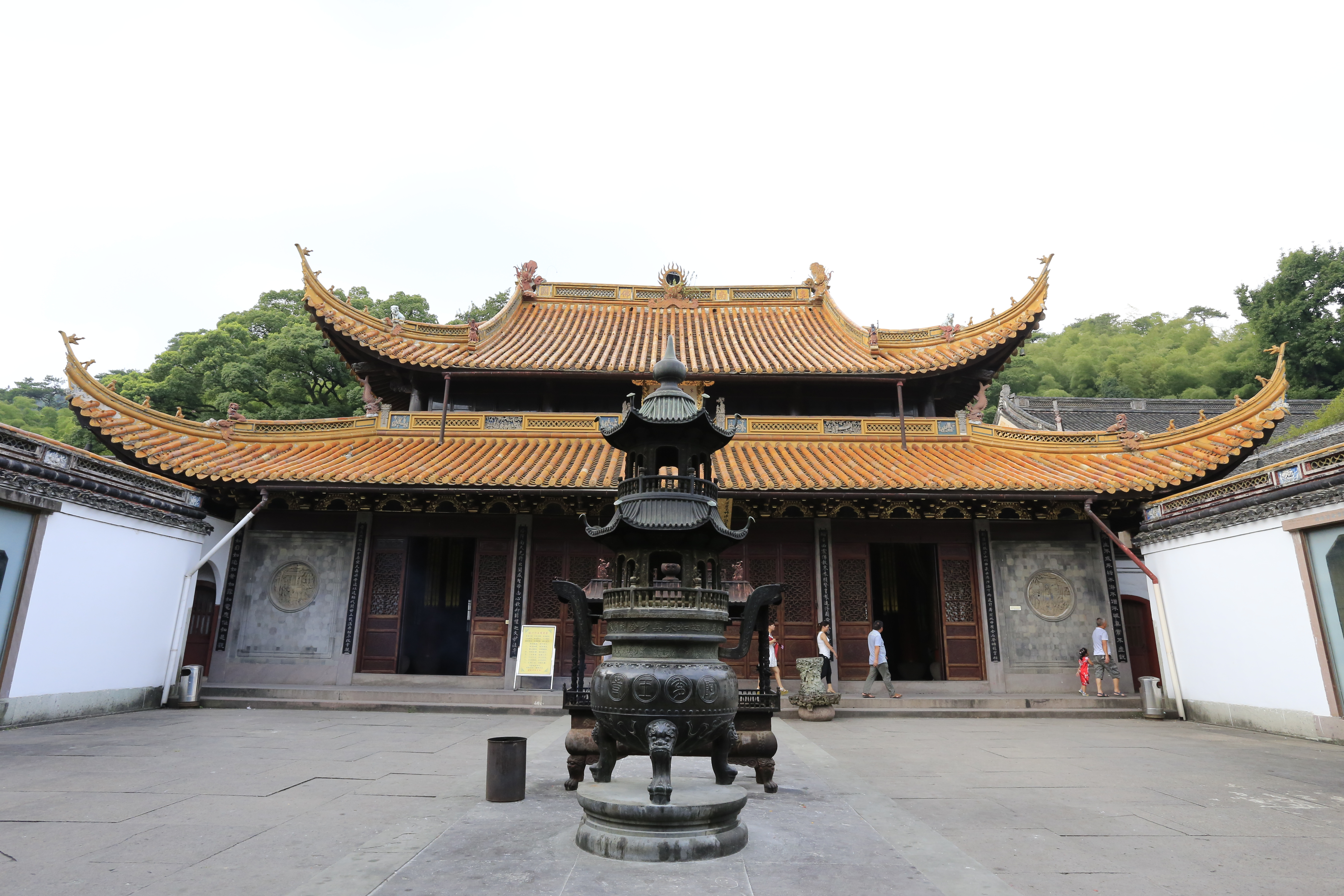 宁波阿育王寺 —— 舍利殿